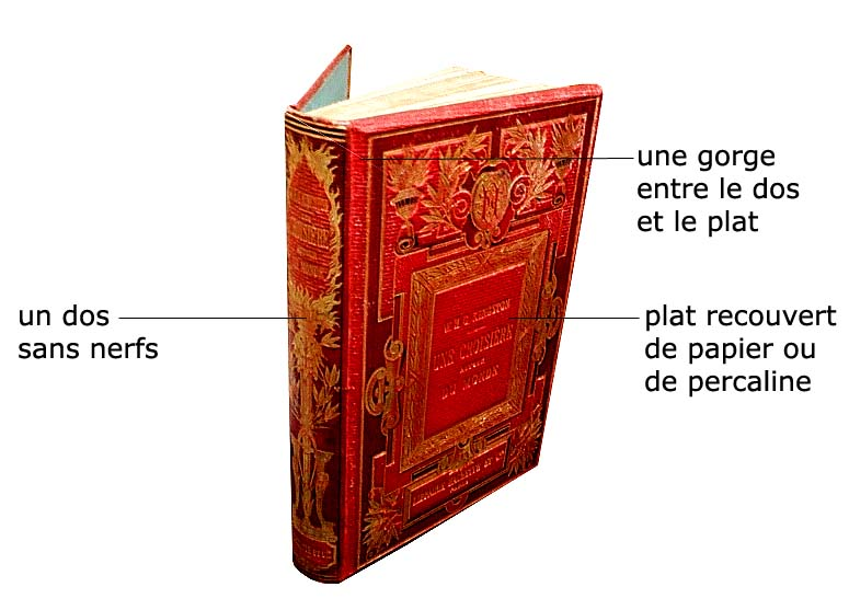 Cette image montre les trois caractéristiques principales d'un livre dit "relié à la Bradel".